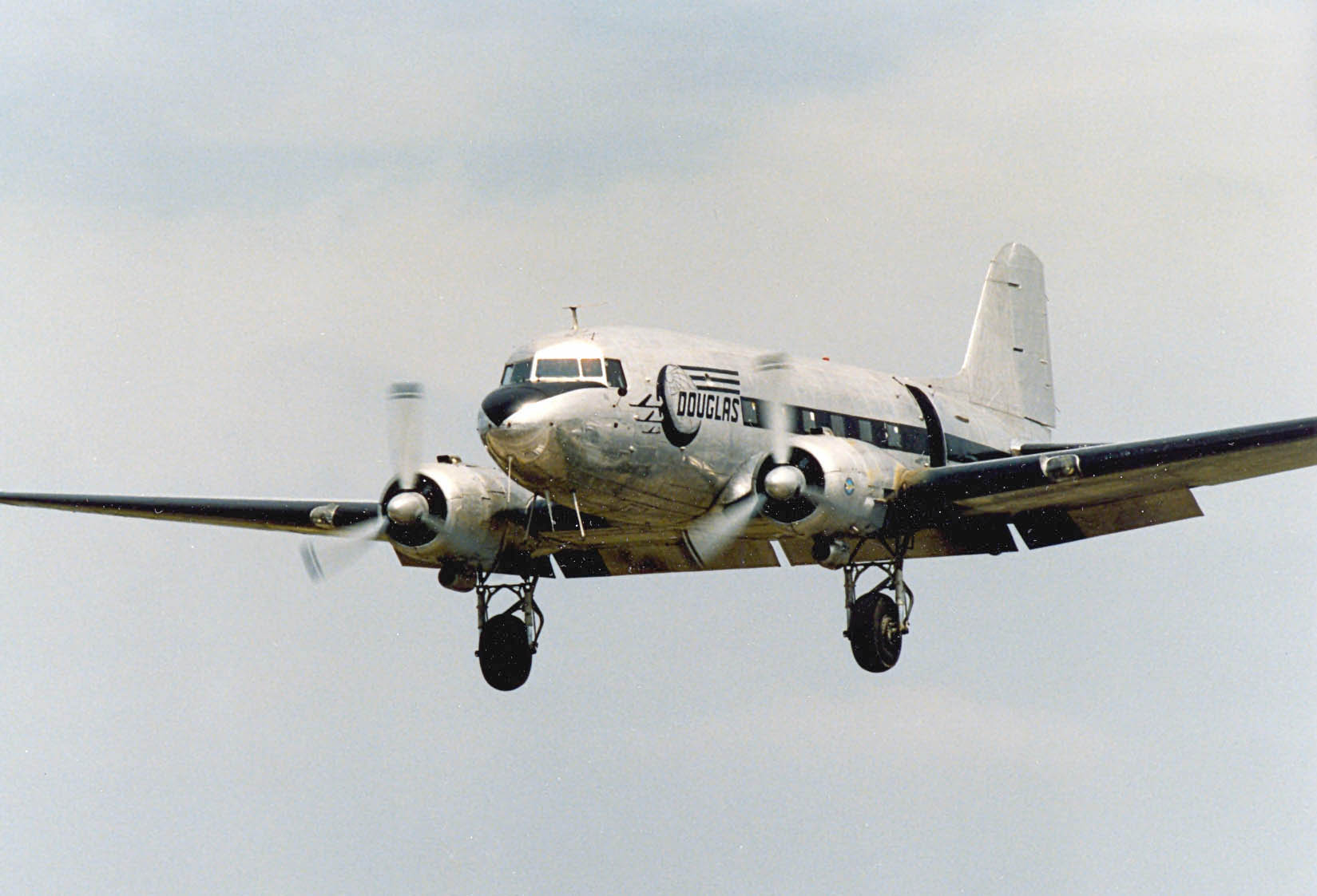 DC-3landingLodi